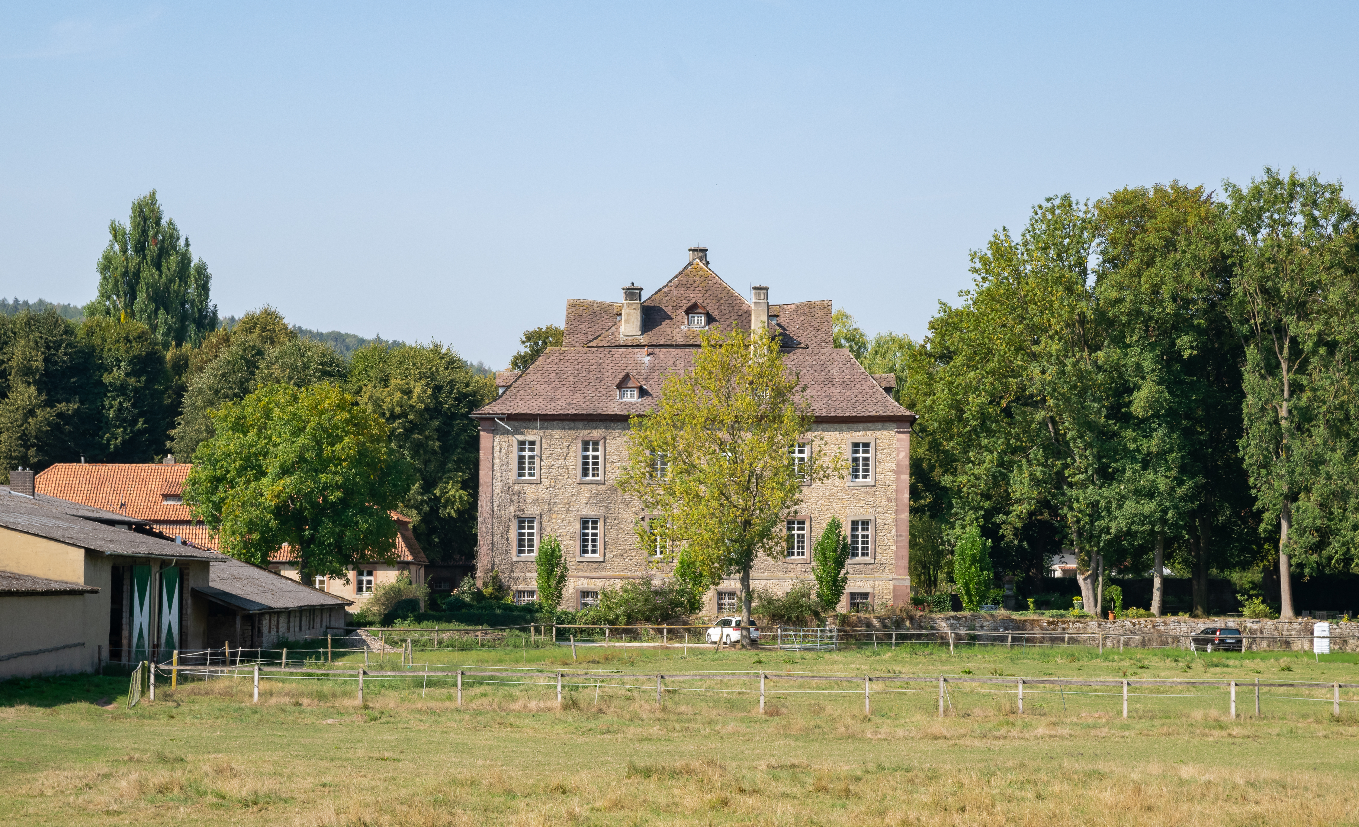 Schloss und Gutshof/Ökonomiegebäude in Welda, Warburg, Ansicht von Osten